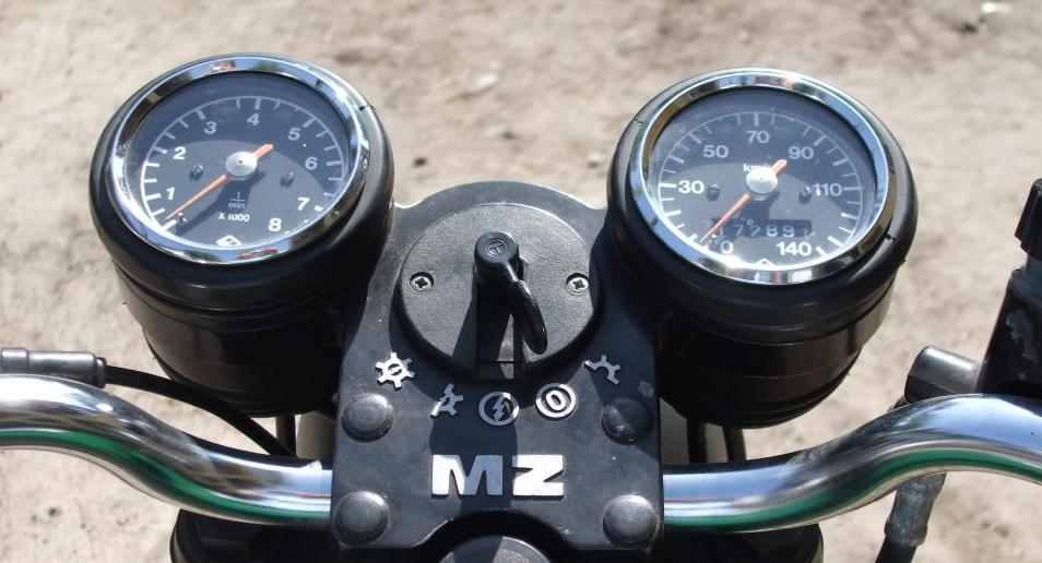 Zegry z motocykla MZ ETZ 251